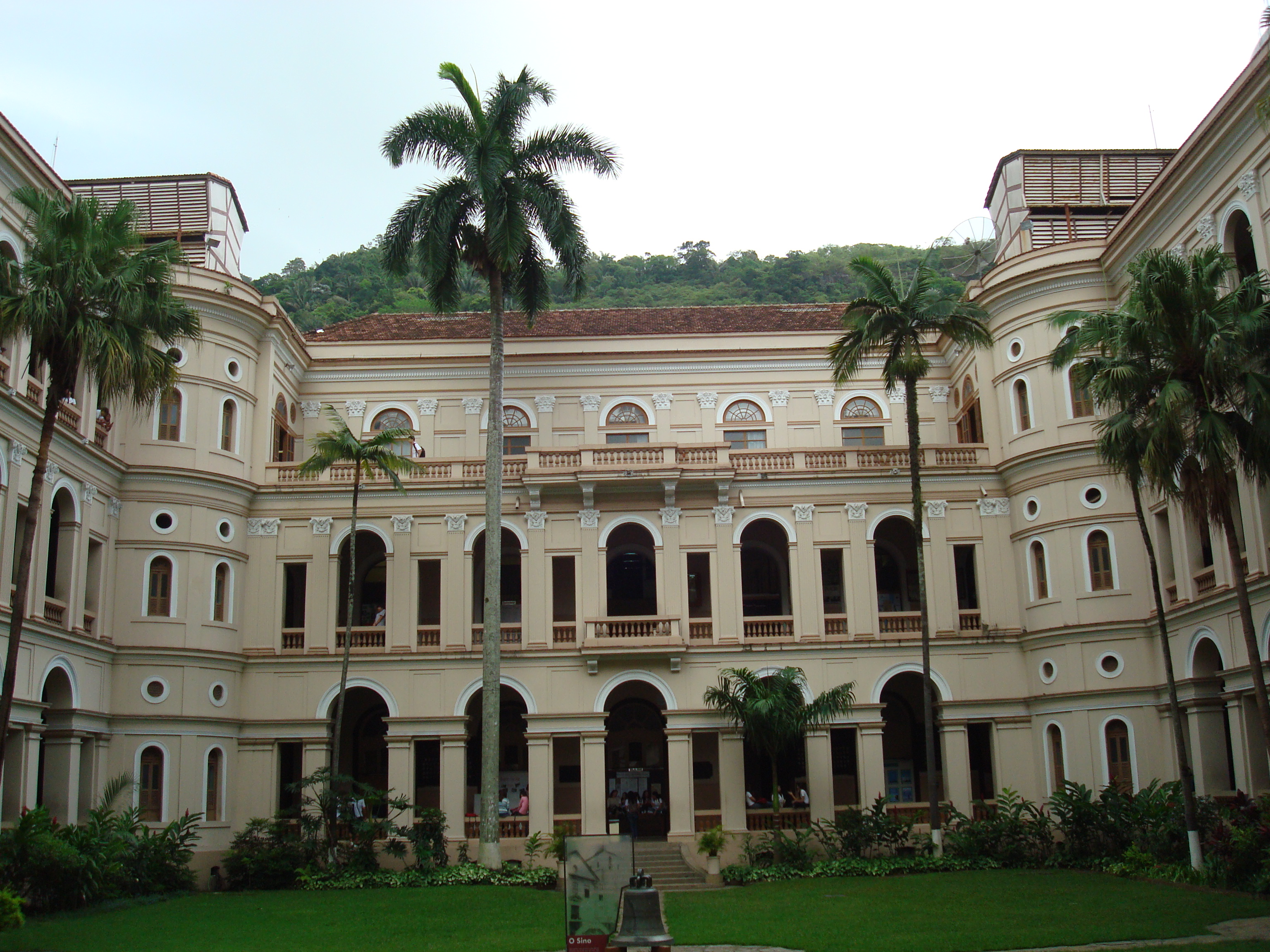 Picture of Colégio Santo Inácio, Rio de Janeiro, Brazil.